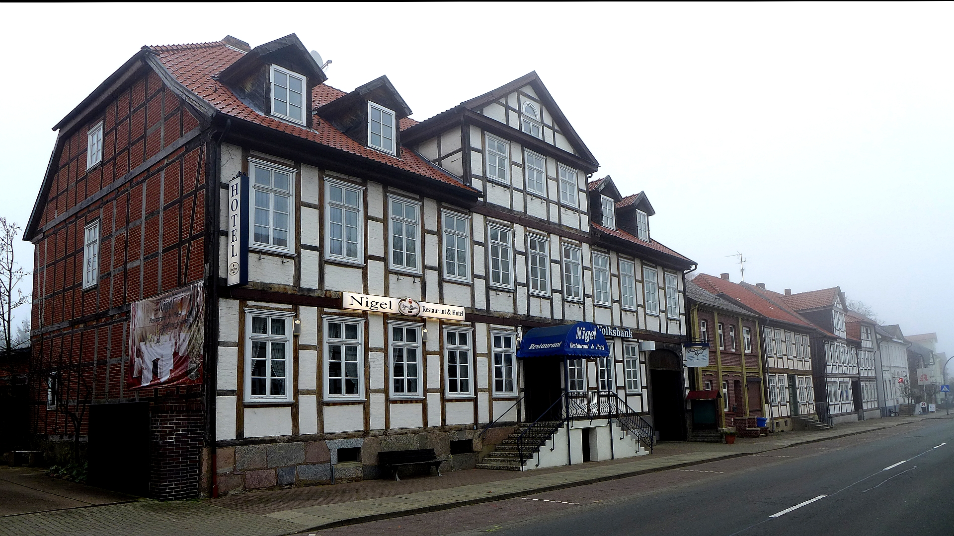 Fachwerkhäuser im Nebel an der Breite Straße von Bergen a. d. Dumme, Ortsteil der Samtgemeinde Lüchow (Wendland). Im Bild links das Hotel Nigel. Die Adresse ist Breite Straße 9.